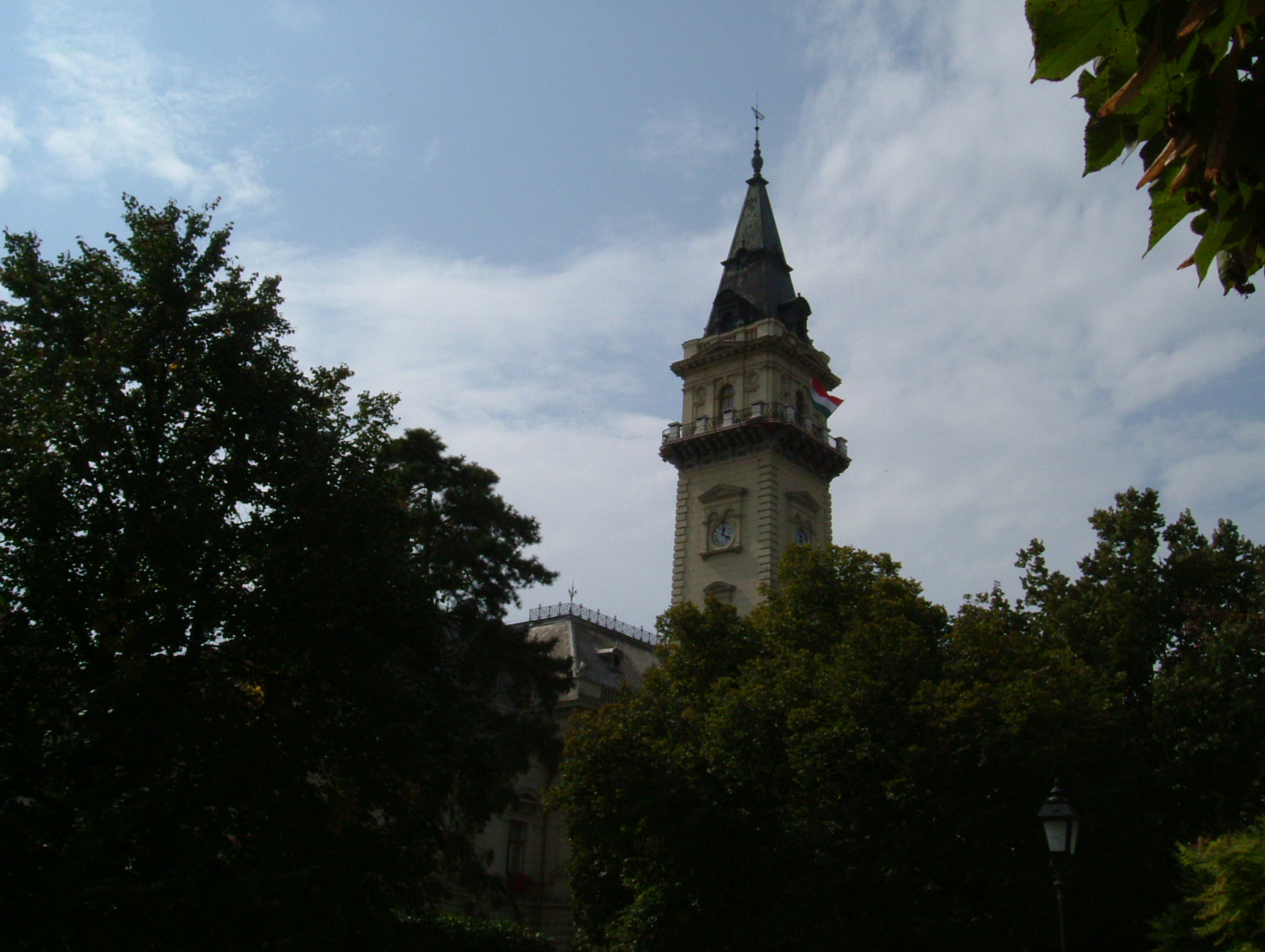 Hódmezővásárhely-Hungary. Town Hall.